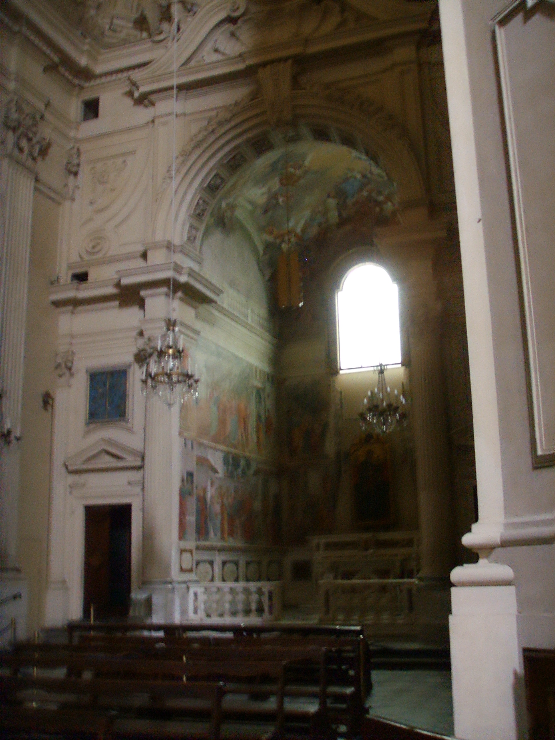 Santa Maria del Carmine, Brancacci Chapel, inside, Florence, Italy